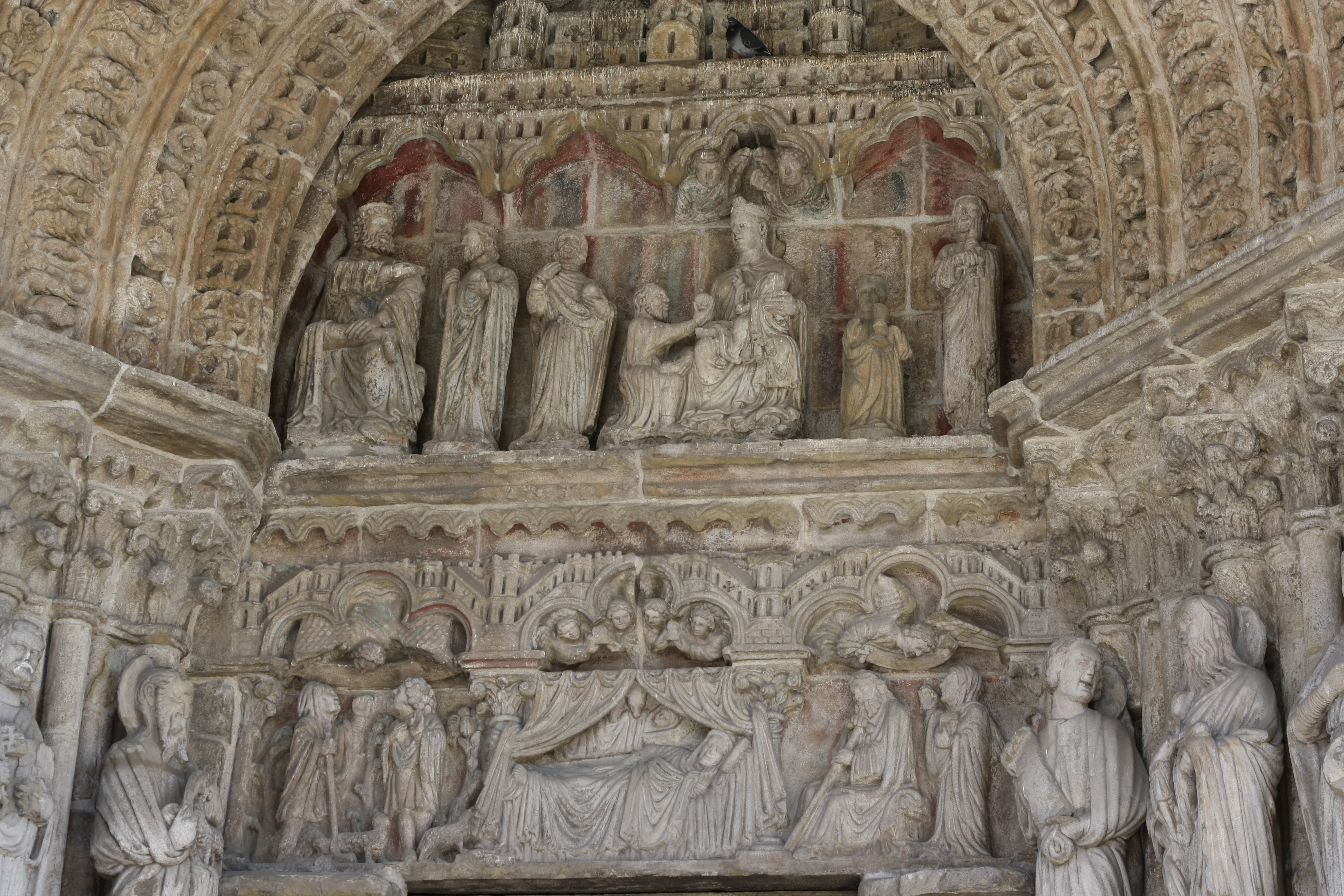 Kathedrale Santa Maria in Tui (Galicien), Tympanon des Hauptportals